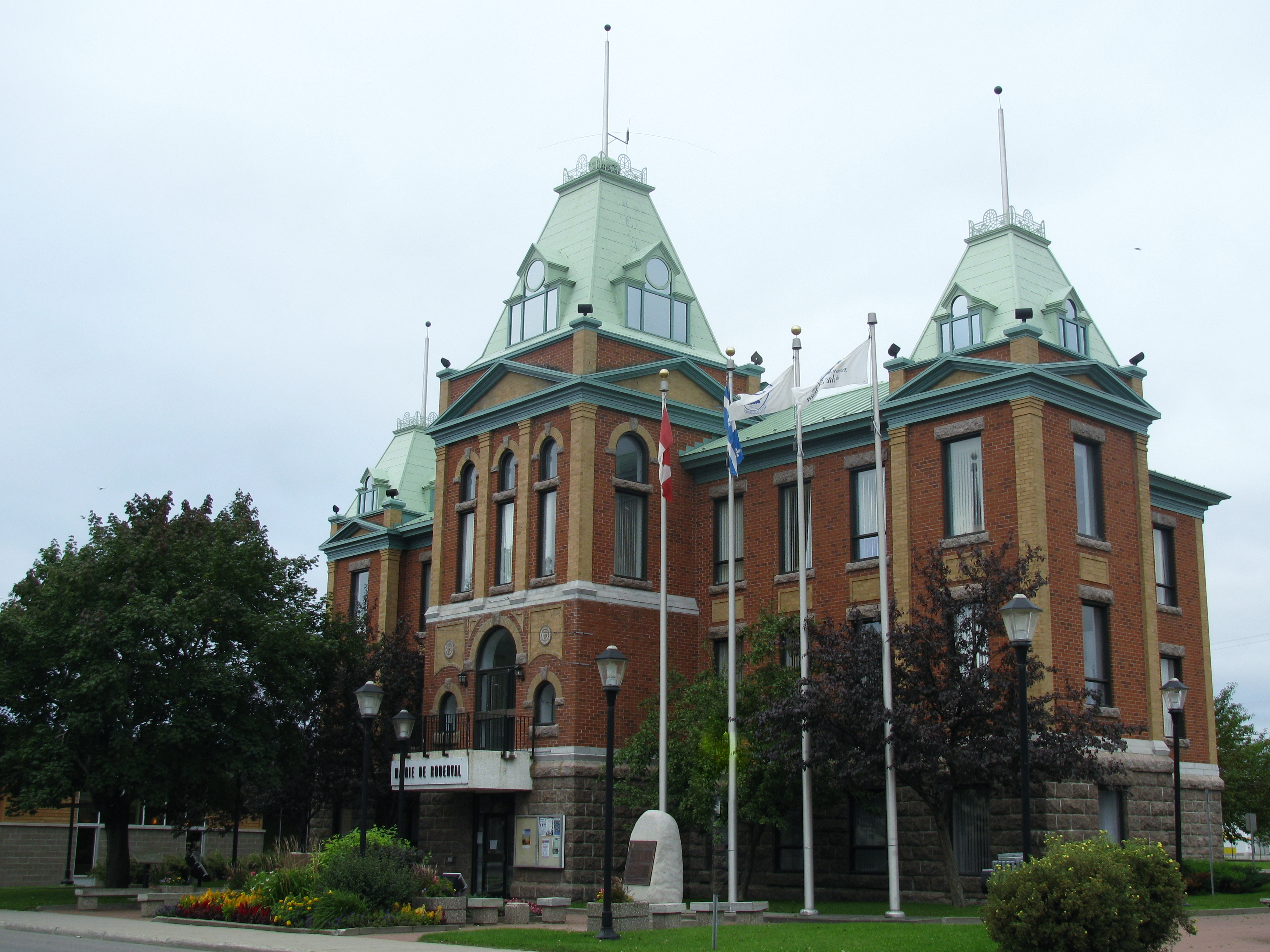 851, Boul. St-Joseph, Roberval, Québec. CANADA